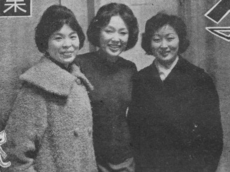 メンバーチェンジ後のスリー・キャッツ 週刊平凡 1960年2月17日号